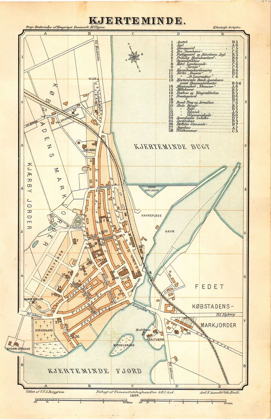 Kort over Kerteminde Købstad 1899